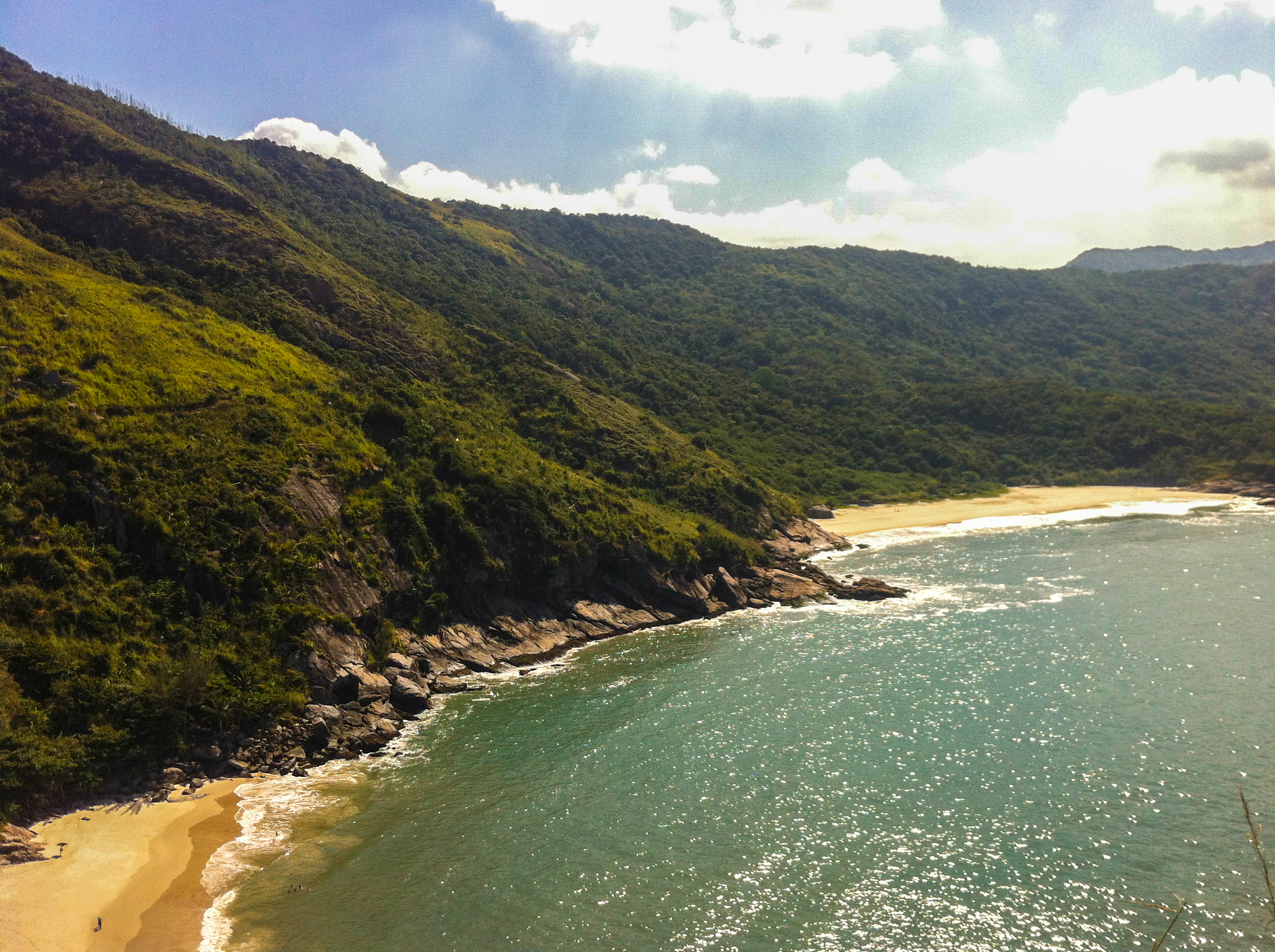 Praias selvagens acessíveis por trilha, parte do Parque Natural Municipal de Grumari